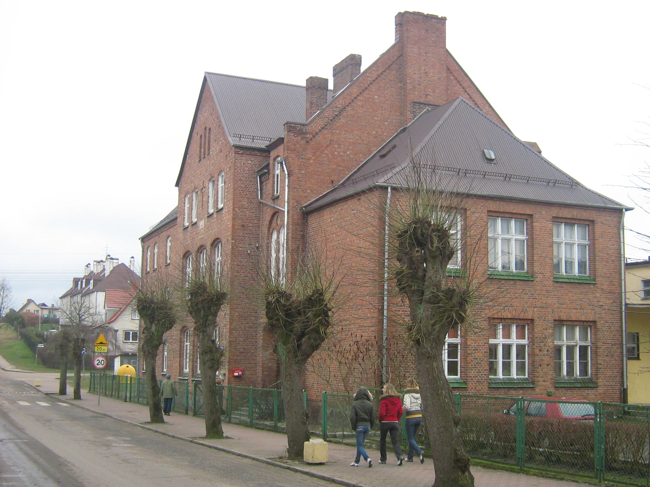 Dawna szkoła w Golczewie. Obecnie mieszkania